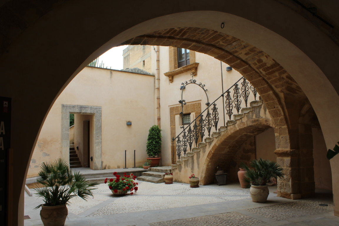 Atrio del Palazzo Panitteri in Sambuca di Sicilia, provincia di Agrigento. All'interno è ospitato il museo archeologico "Palazzo Panitteri"